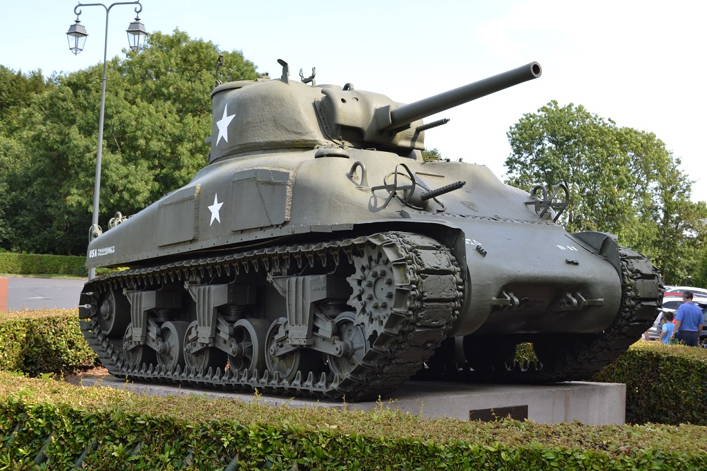 Char Sherman, musée mémorial "Bataille de Normandie", Bayeux.